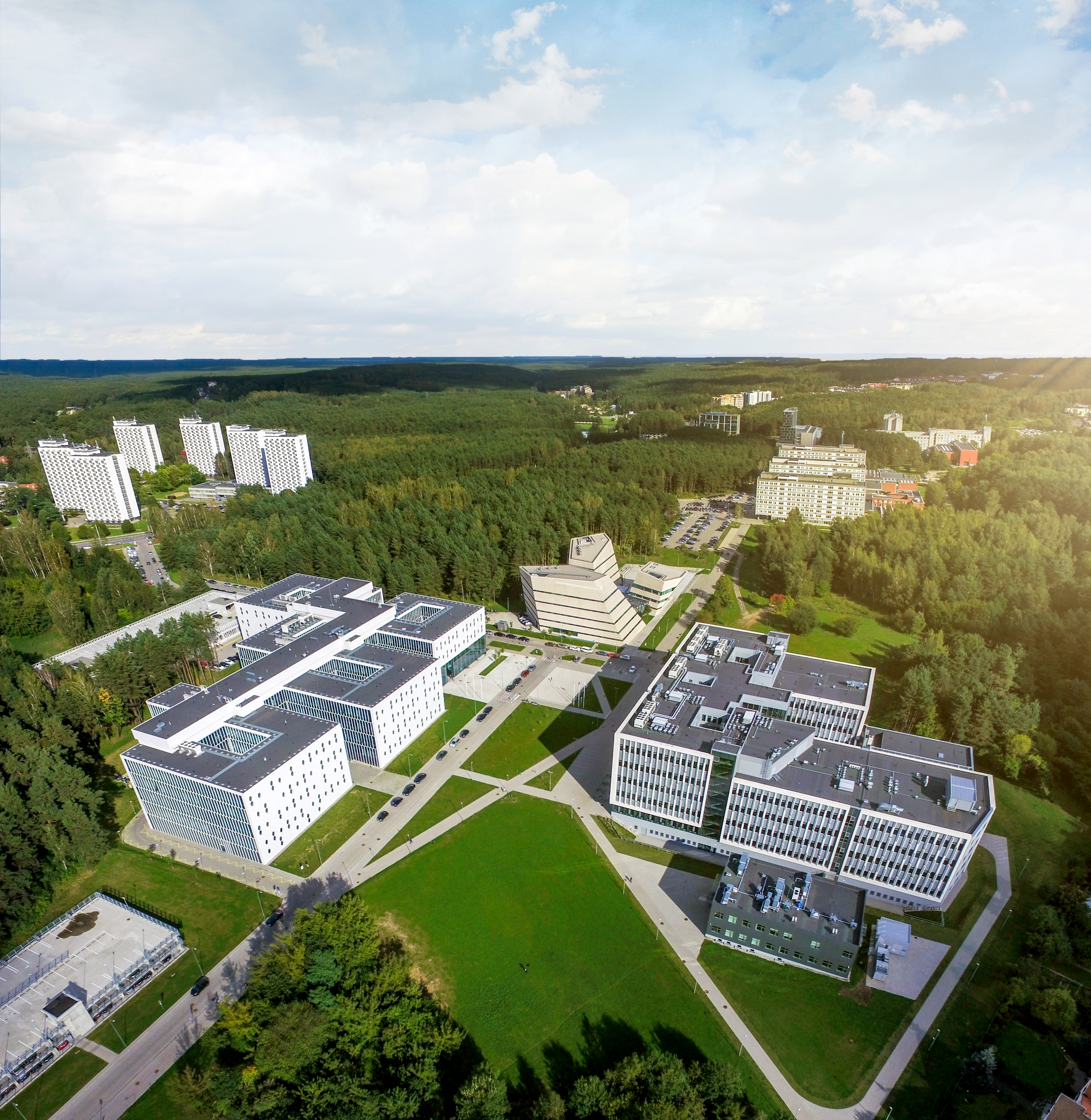 Biotechnologijų verslo inkubatorius, VU Gyvybės mokslų centras, Fizinių ir technologijos mokslų centras, VU Mokslinės informacijos ir komunikacijos centras.